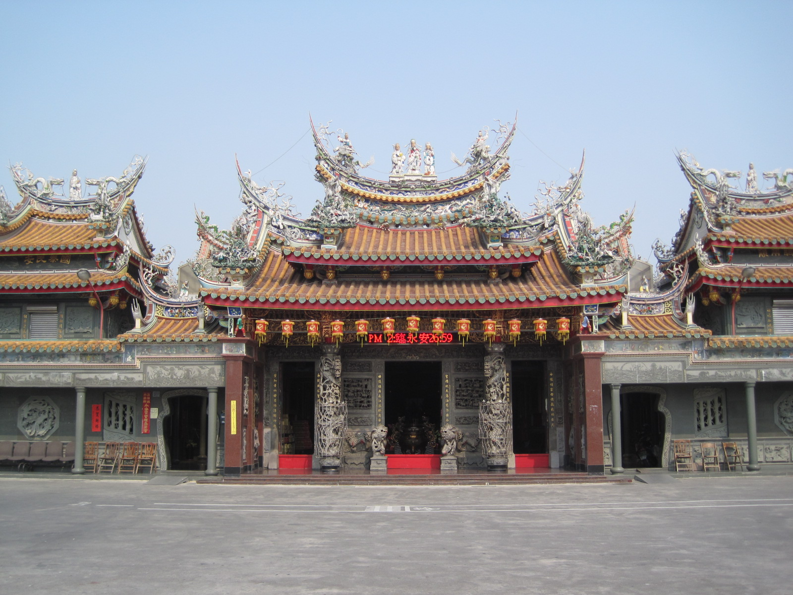 位在高雄市永安區的永安宮。